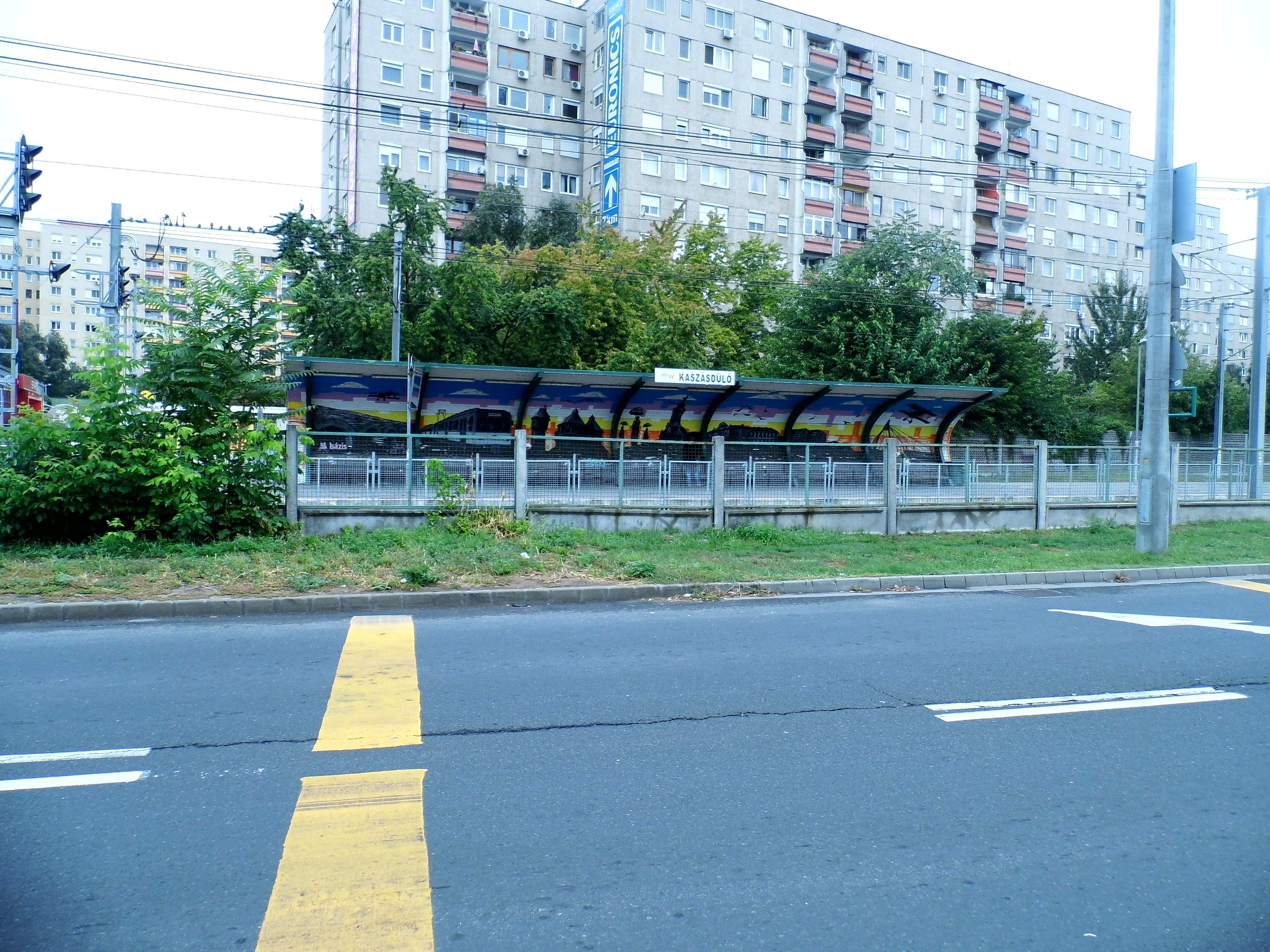 Kaszásdűlő HÉV